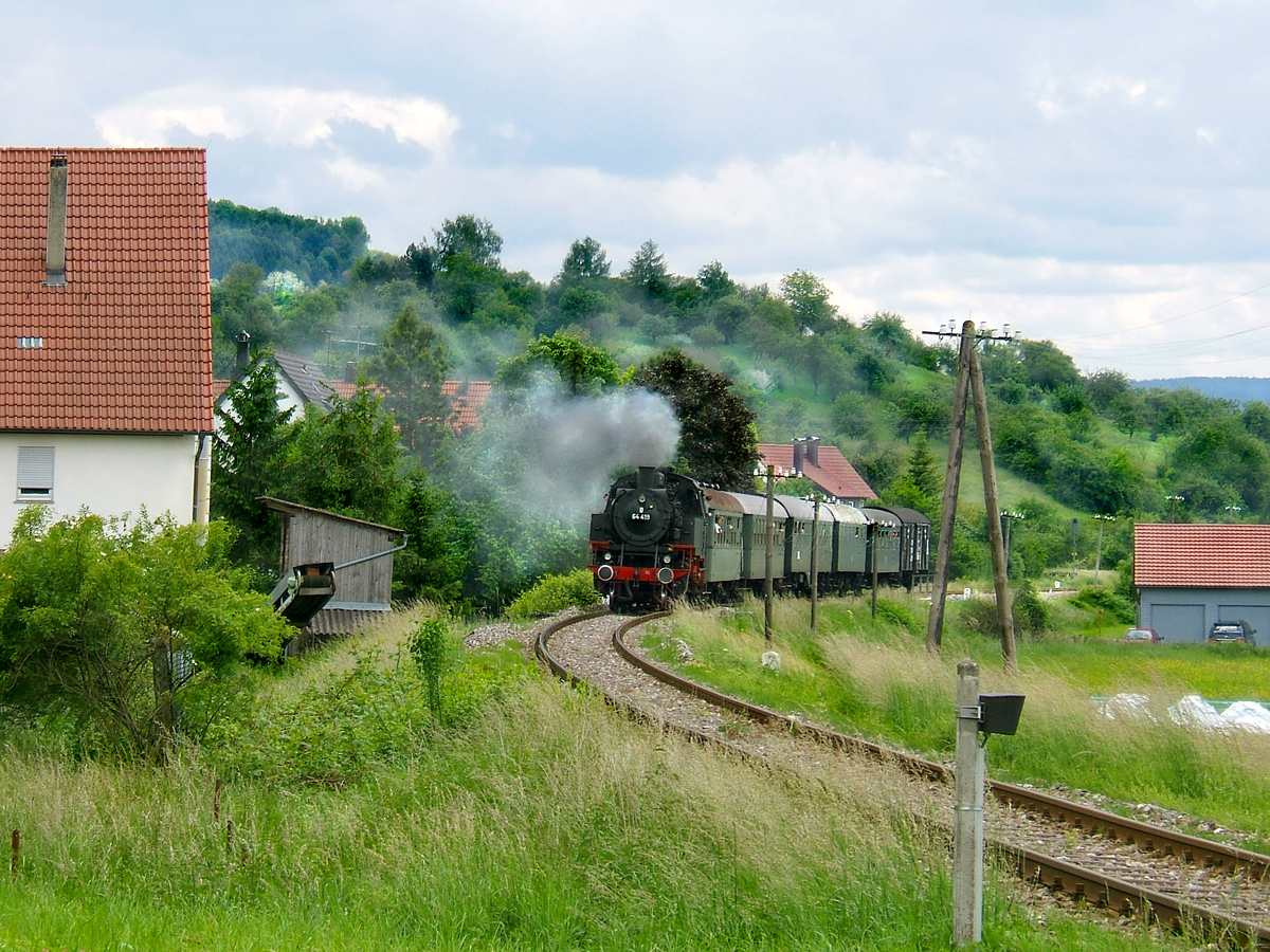 Dampfzug der DBK Historische Bahn mit Lok 64 419 am Mühlentag 2005 kurz vor der Ankunft in Rudersberg-Michelau, Deutschland